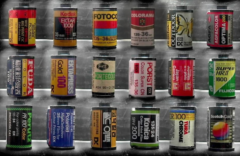 Rollos de pilicula fotografica de 35 mm